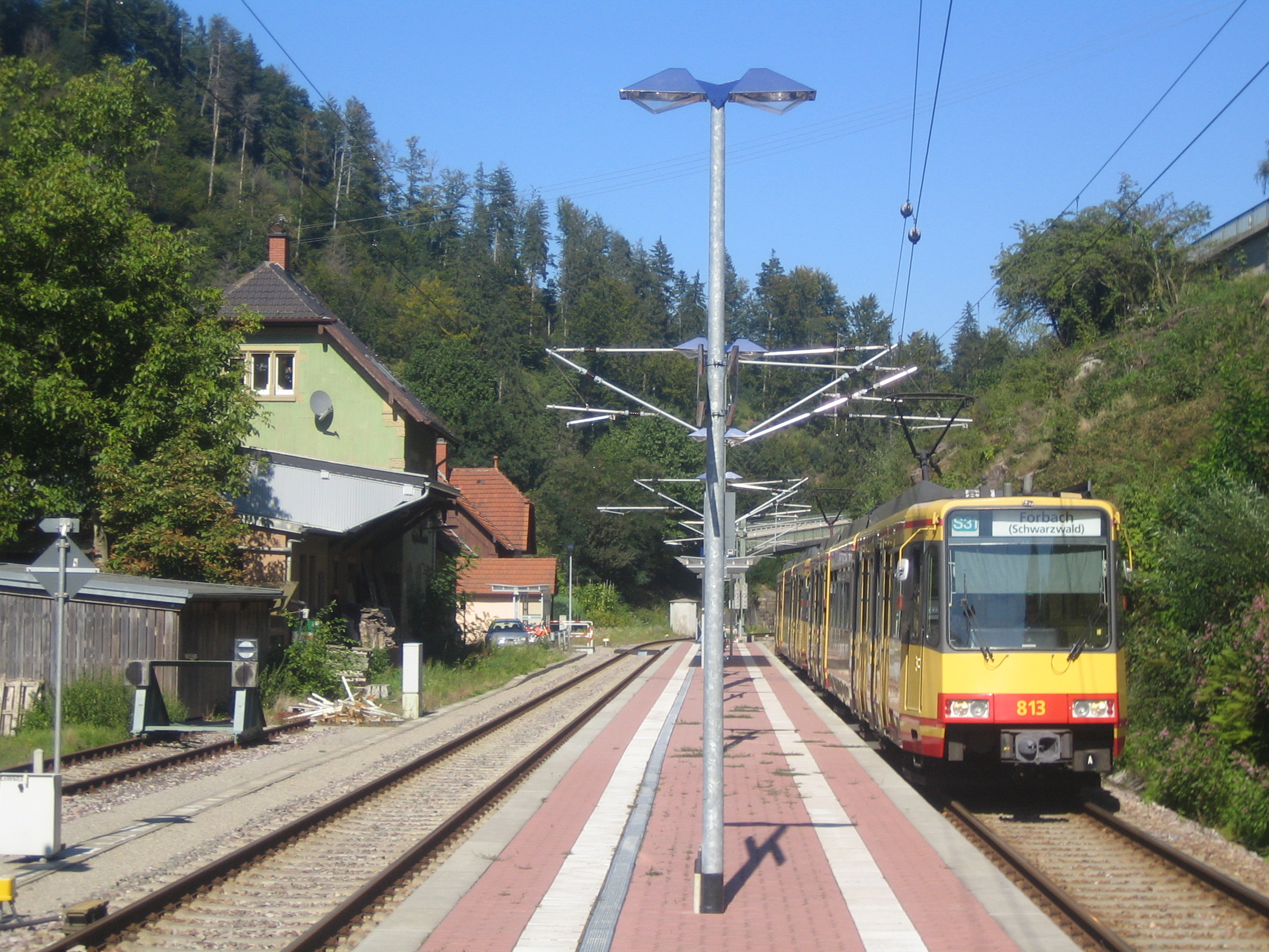 Bf. Langenbrand, selbst fotografiert